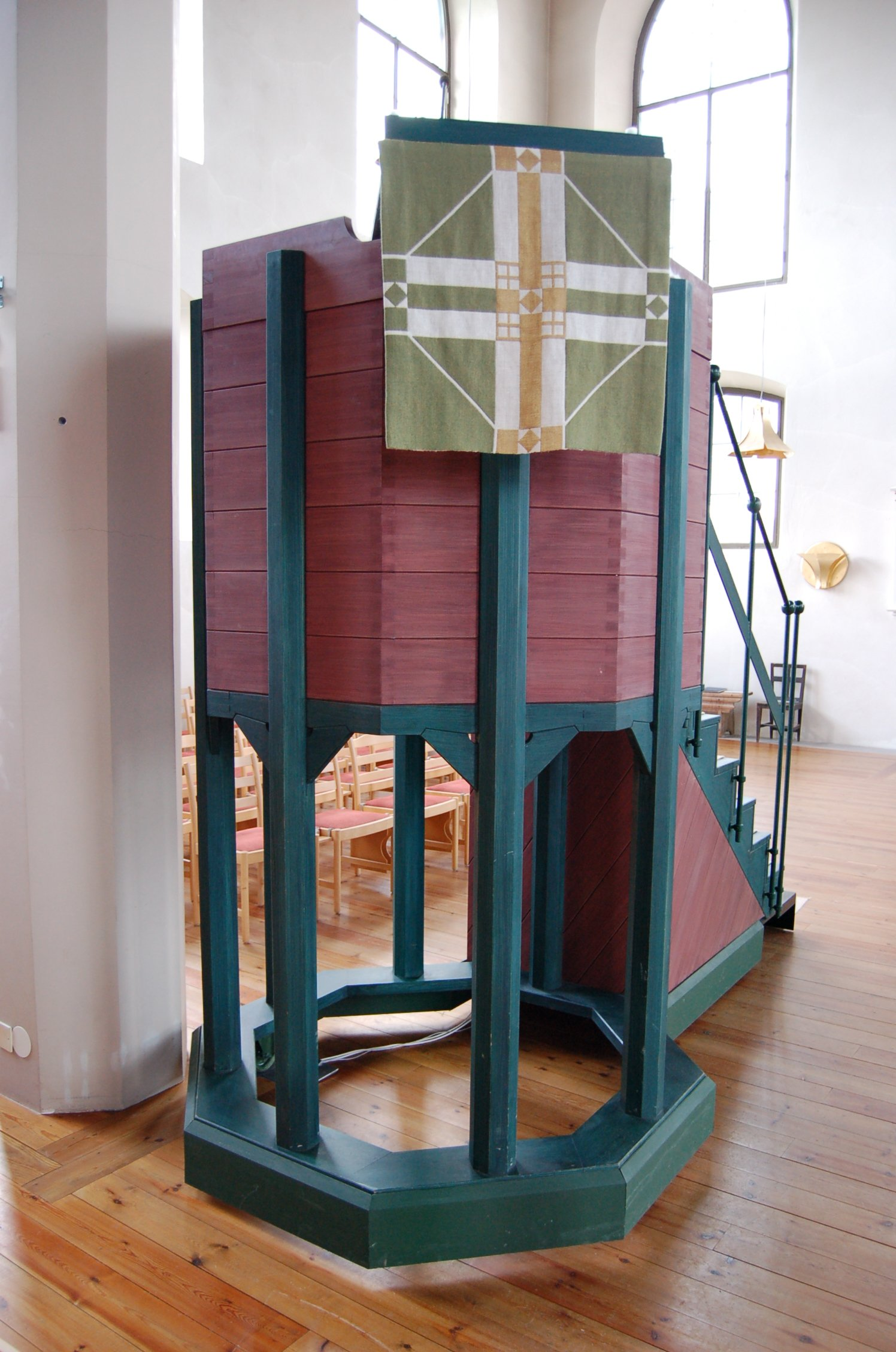 Brunskogs kyrkas predikstol